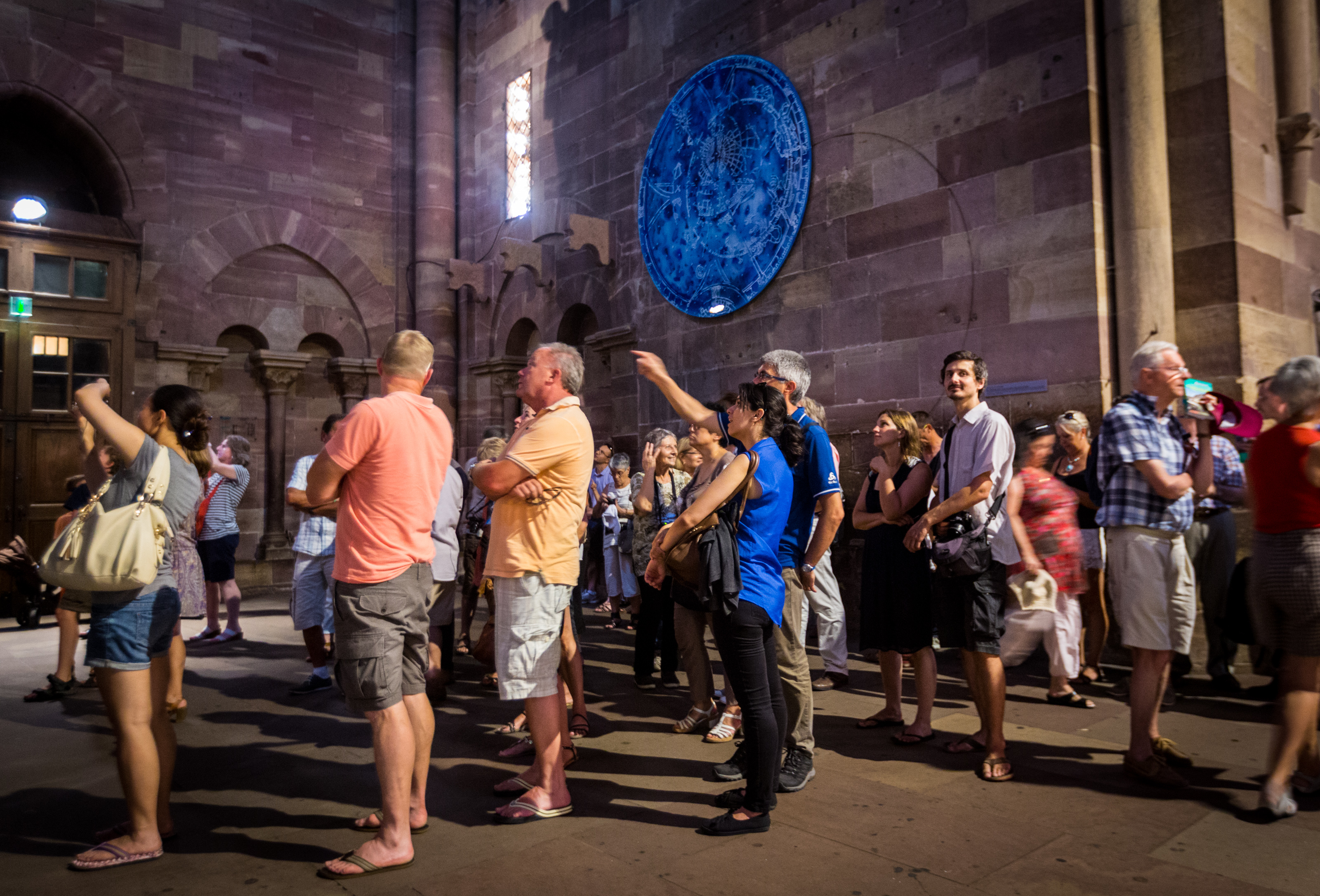 Strasbourg touristes à l’horloge astronomique août 2015